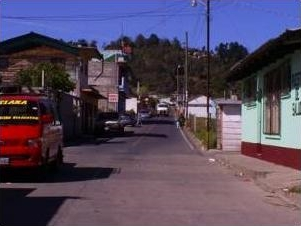 Vista de Esquipulas Palo Gordo, Cabecera municipal del Municipio con el mismo nombre, en la Departamento de San Marcos en Guatemala